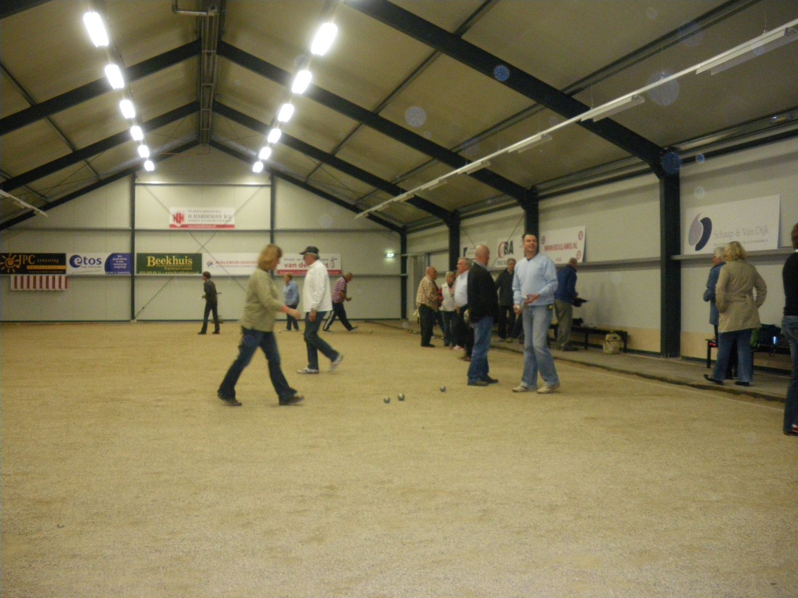 Jeu de boule spelers in een Boulodrome bij Boulamis